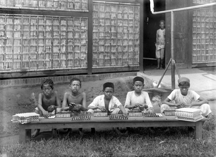 Negatief. Kinderen aan het werk in een sigarettenfabriek, Nederlands-Indië